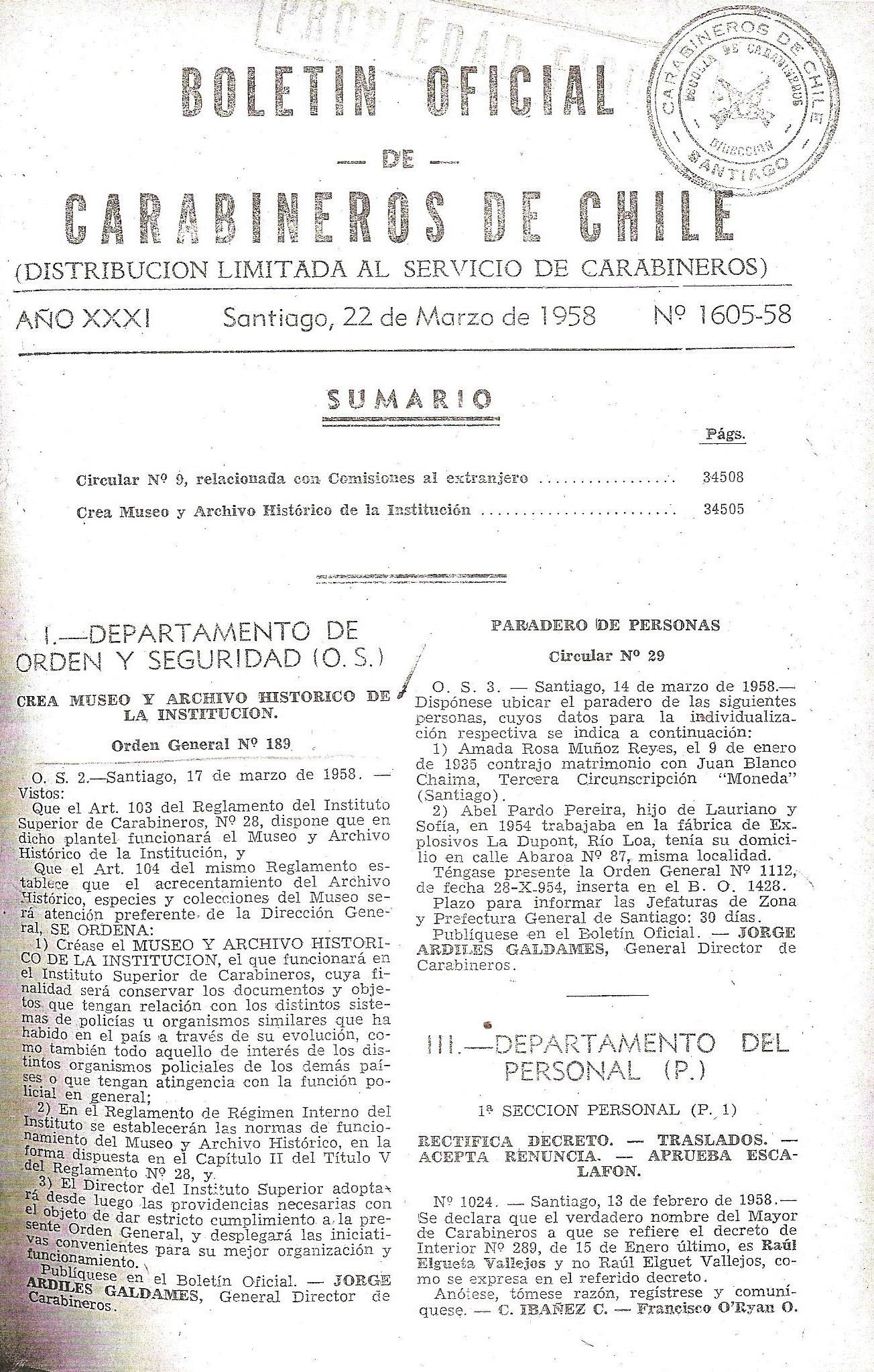 Orden General N° 189 que crea el Museo Histórico Carabineros de Chile.